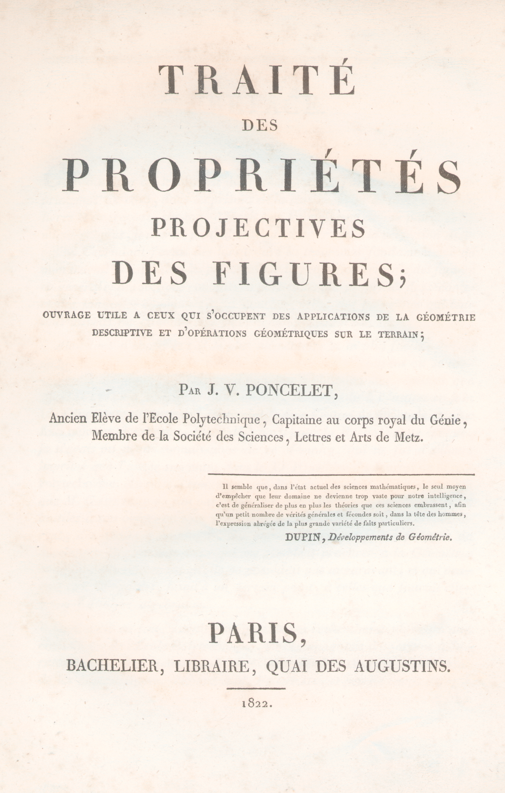 Title page of 1822 Poncelet's Traité des propriétés projectives des figures